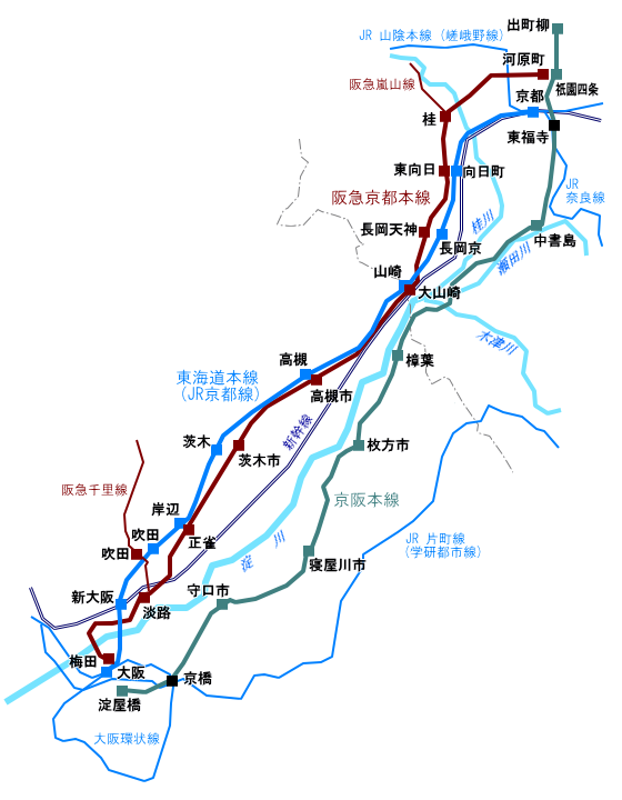 大阪 - 京都間で競合する鉄道の路線図